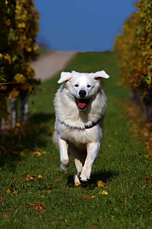 Cosmo von der Stockacher Halde a Slovenský Cuvac